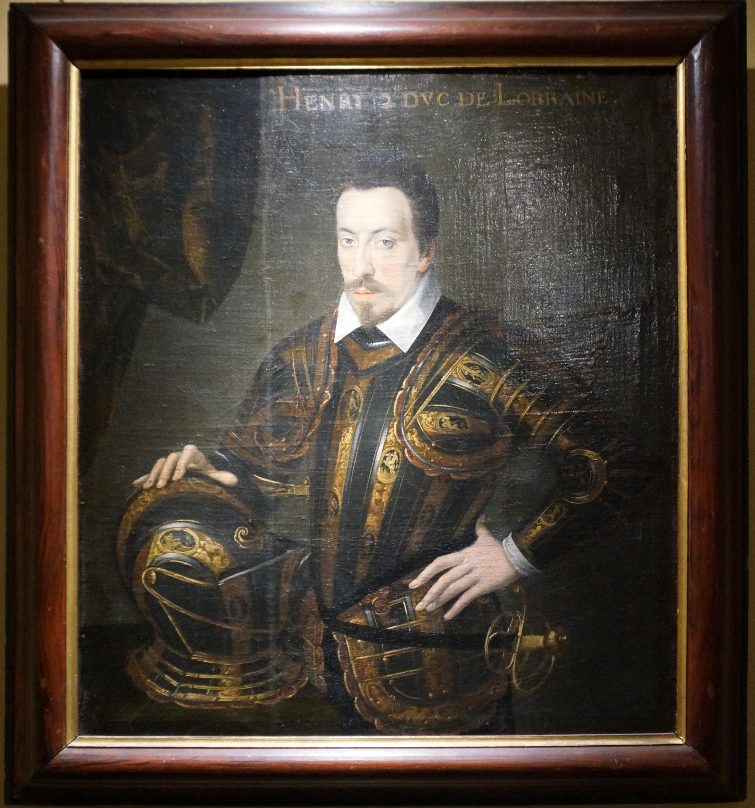 Portrait de Henry II duc de Lorraine (1563-1624)